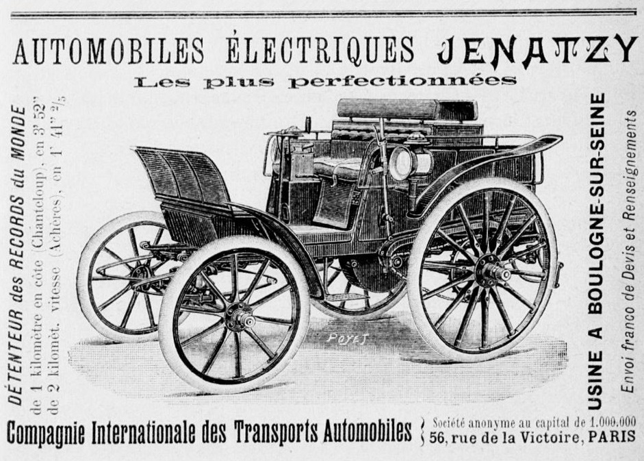 Publicité Automobiles Jenatzy 1899 L'Almanach des Sports 1899 sous la direction de Maurice Leudet , librairie Paul Ollendorff, p.125